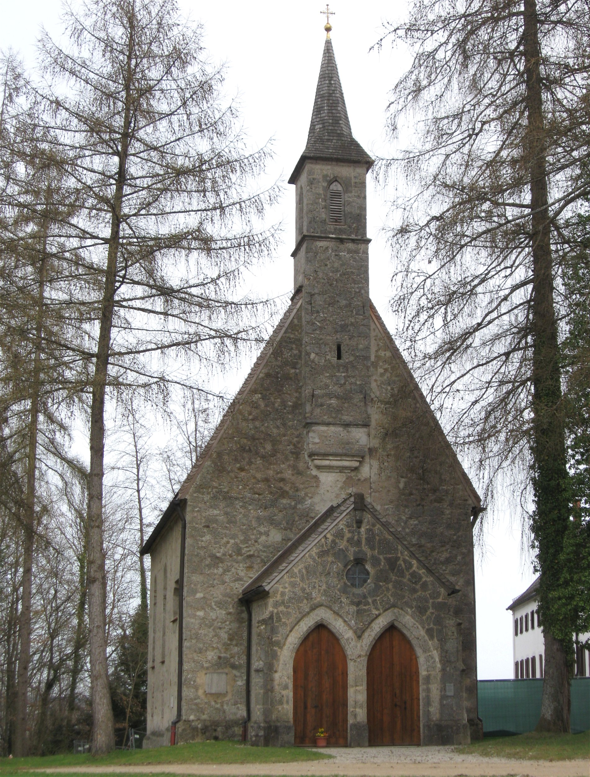 Alte Kath. Pfarrkirche St. Maria; spätgotische Anlage, 1469 geweiht, umgebaut 1630-32